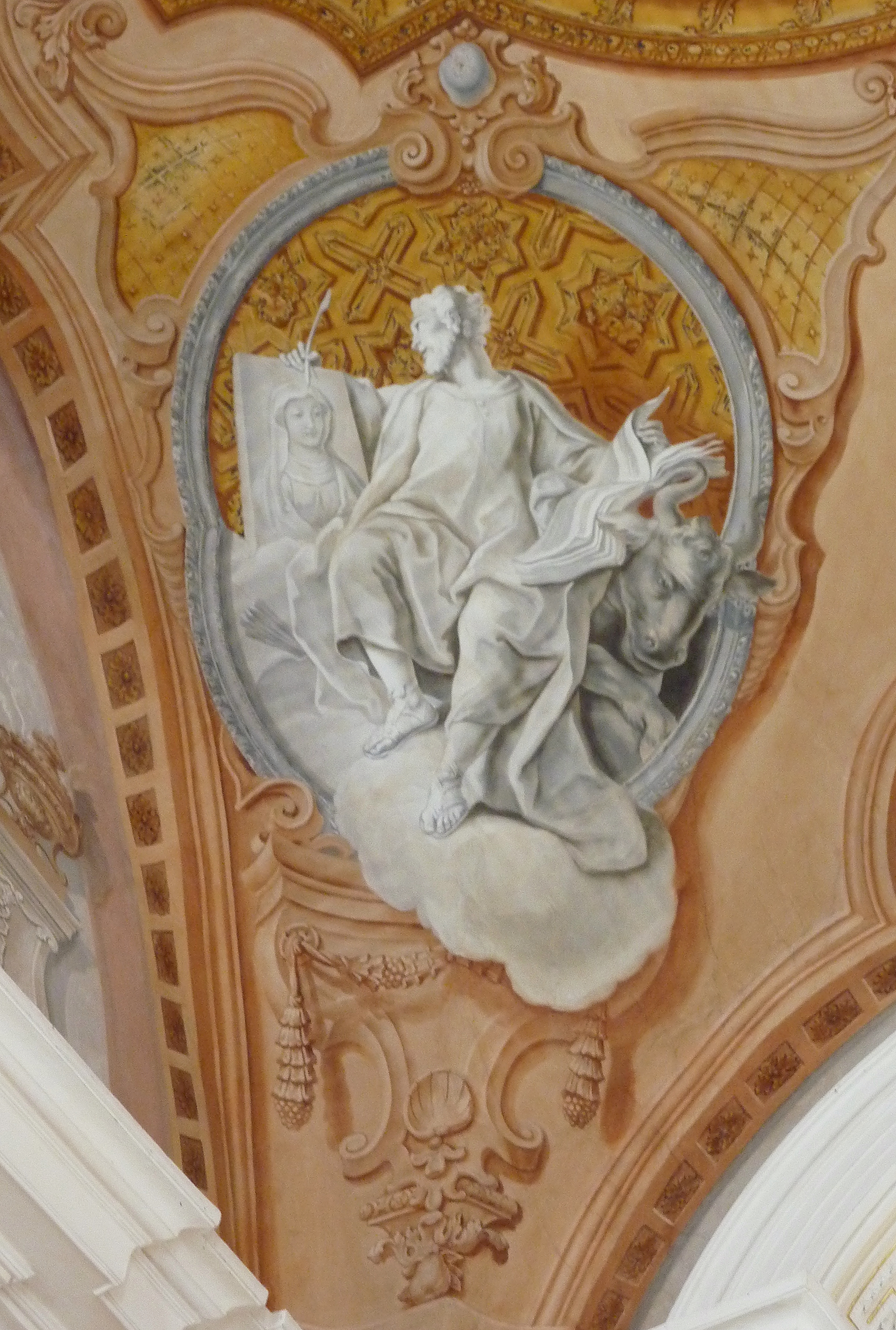 Katholische Pfarrkirche, ehemalige Kloster- und Wallfahrtskirchellfahrtskirche St. Leonhard in Unterliezheim, einem Ortsteil von Lutzingen im Landkreis Dillingen an der Donau (Bayern), Deckenfresko über der Vierung, Grisaille im Zwickel; Darstellung: Evangelist Lukas, der Maria malt